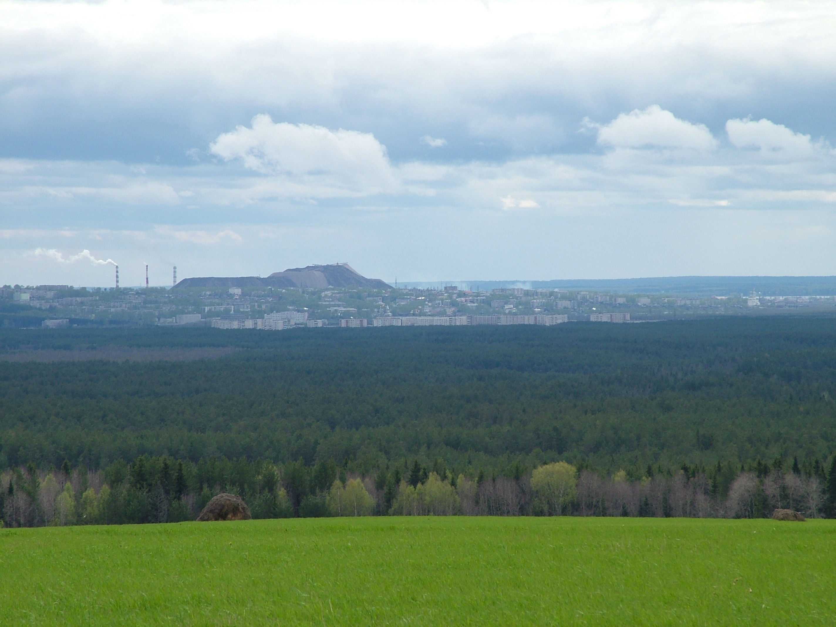 Вид с северной возвышенности на город Соликамск